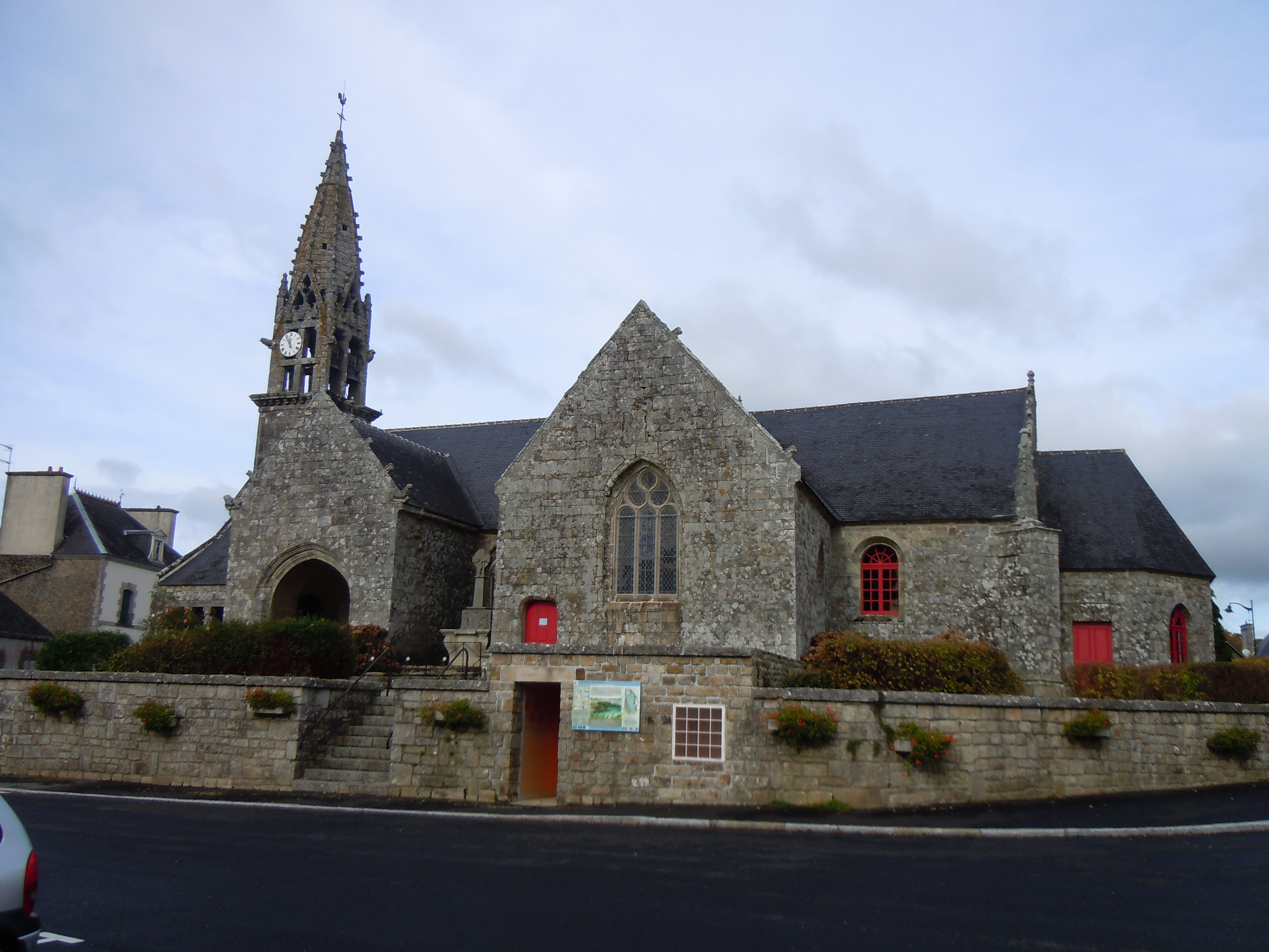 église paroissiale Saint-Barnabé de Langoëlan (département du Morbihan)